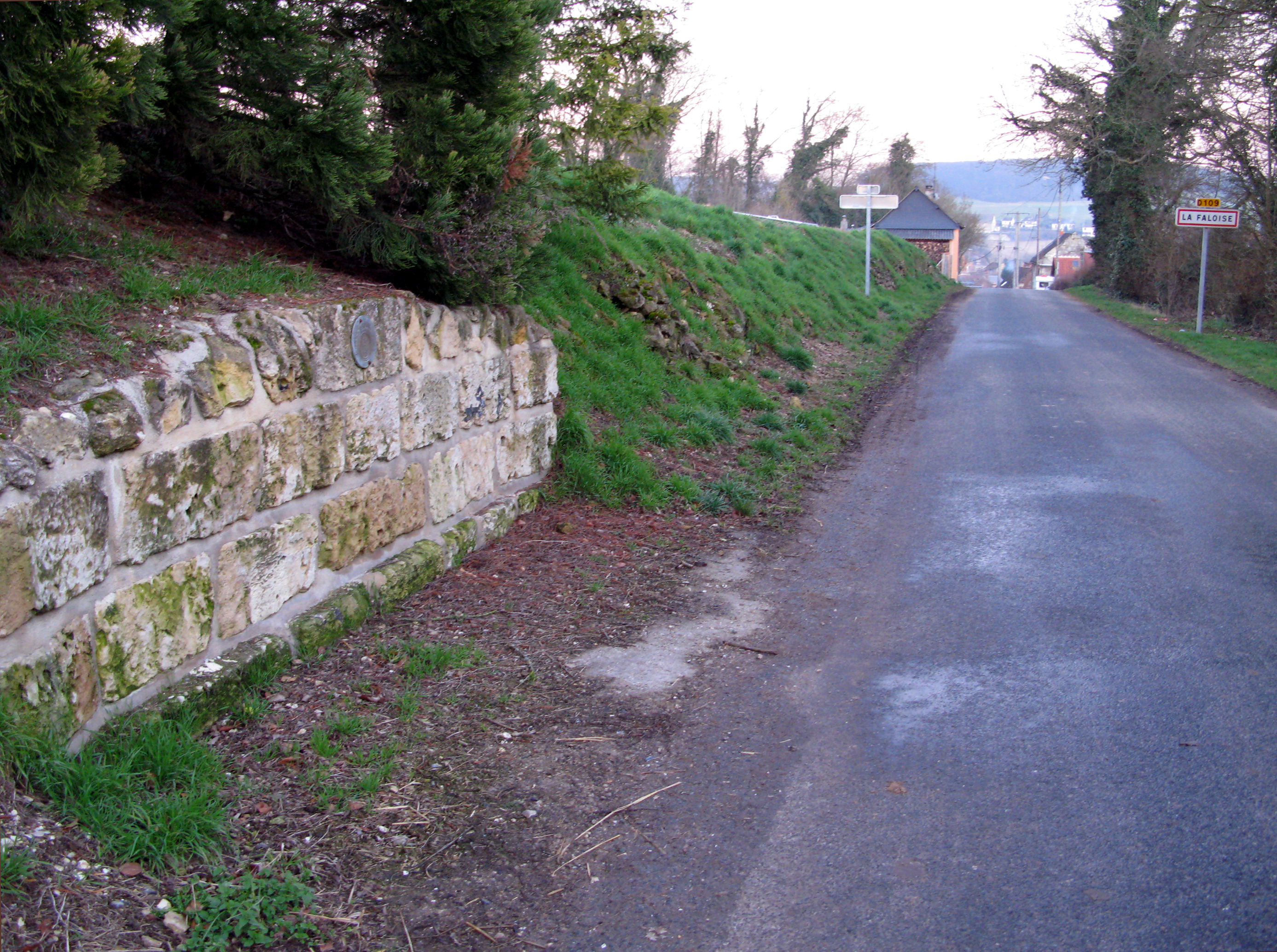 La Faloise (Somme, France) - L'entrée dans le village par l'Ouest (route venant de Hallivillers). Au fond, on voit la vallée de la Noye, avec les marais. A gauche, le mur sur le bas-côté porte une petite plaque ronde signalant la Méridienne Verte. .